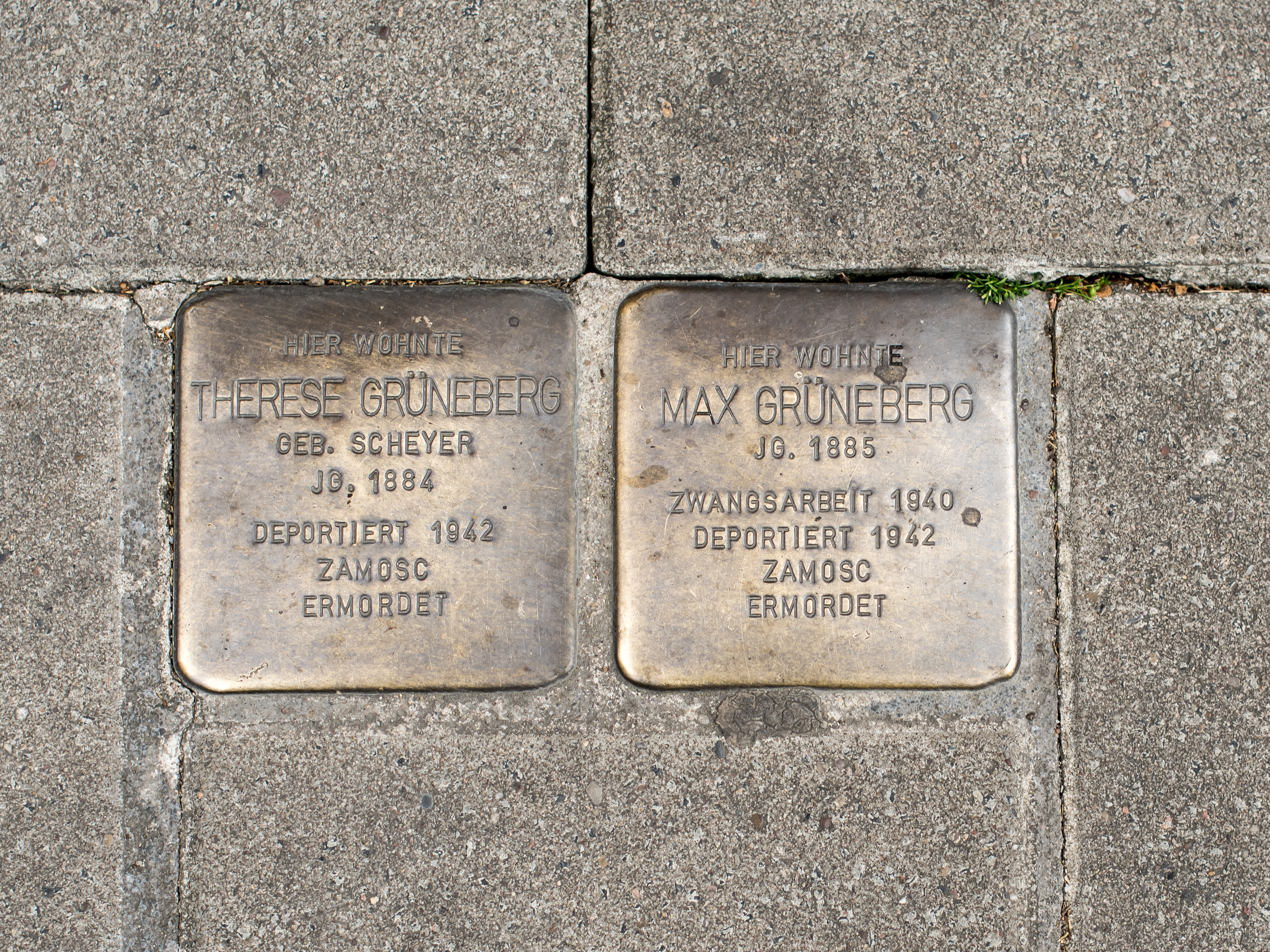 Stolpersteine von Max und Therese Grünberg in Dortmund